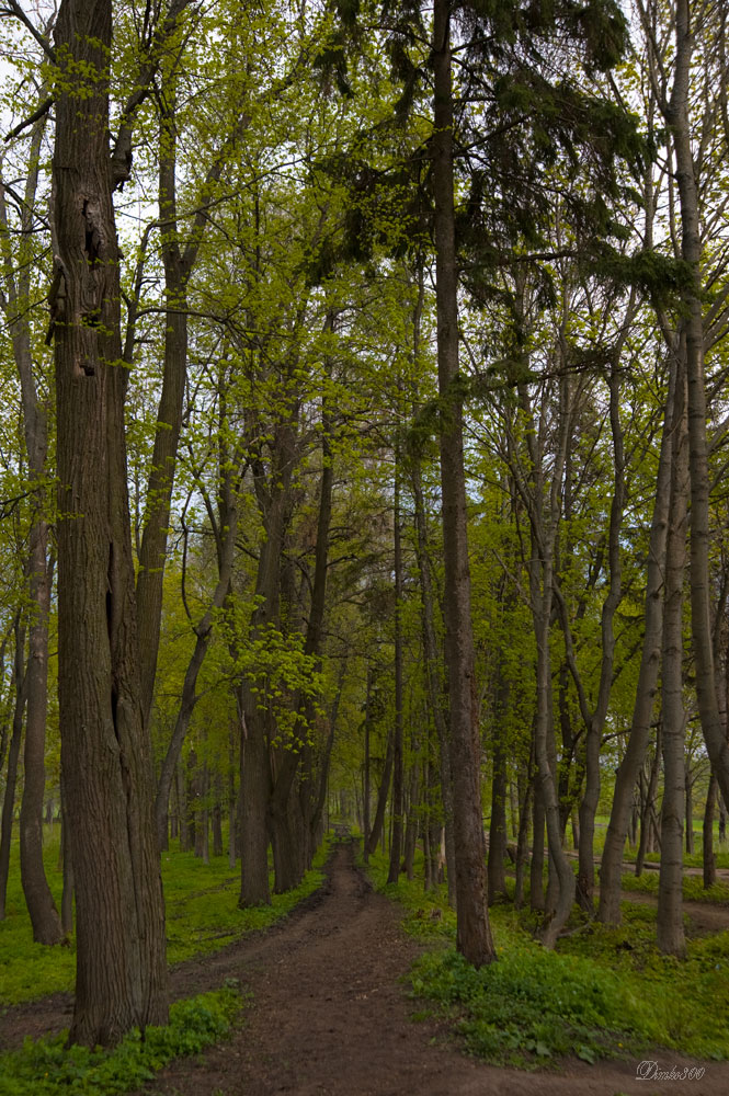 Новотомниковский парк, Моршанский район This image is related to the protected area of Russia number 6810027